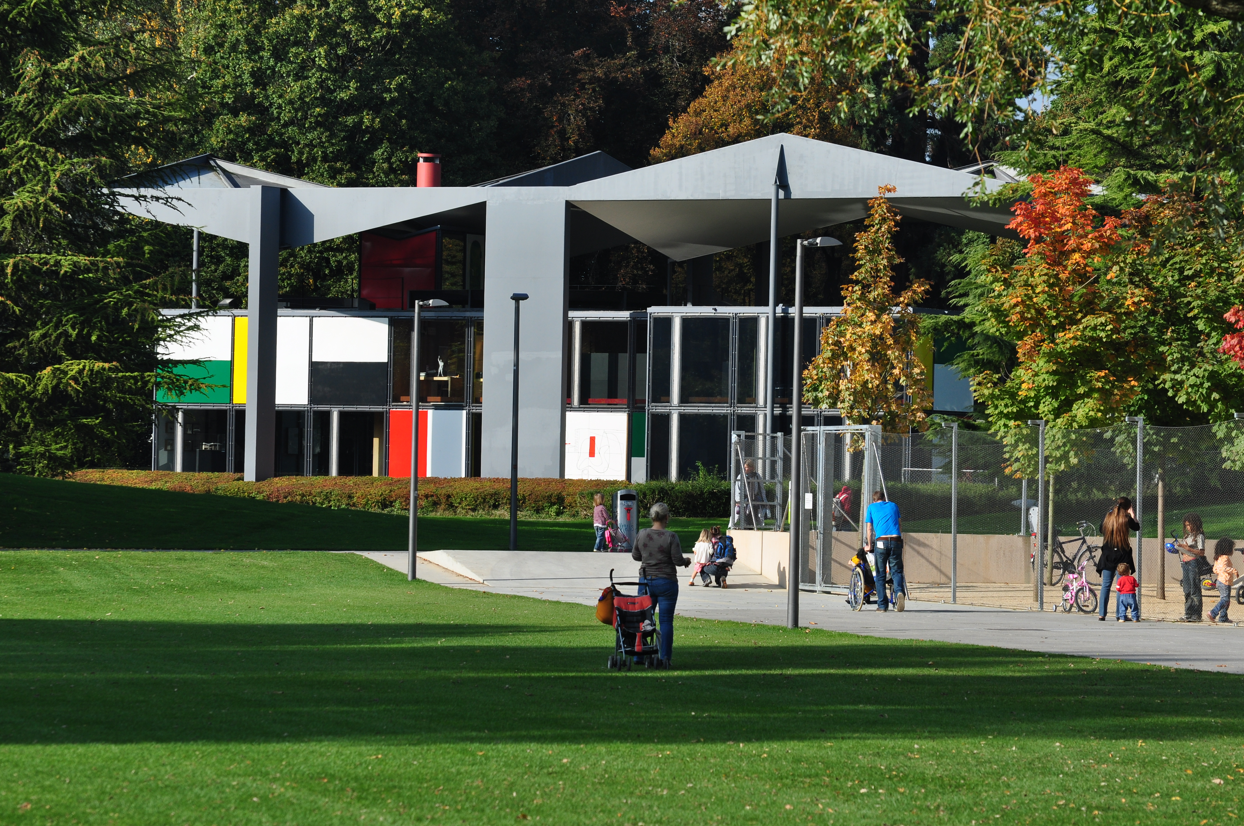 Centre Le Corbusier as seen from Blatterwiese in Zürich-Seefeld (Switzerland) nearby Kugelbrunnen fountain at Zürichhorn.